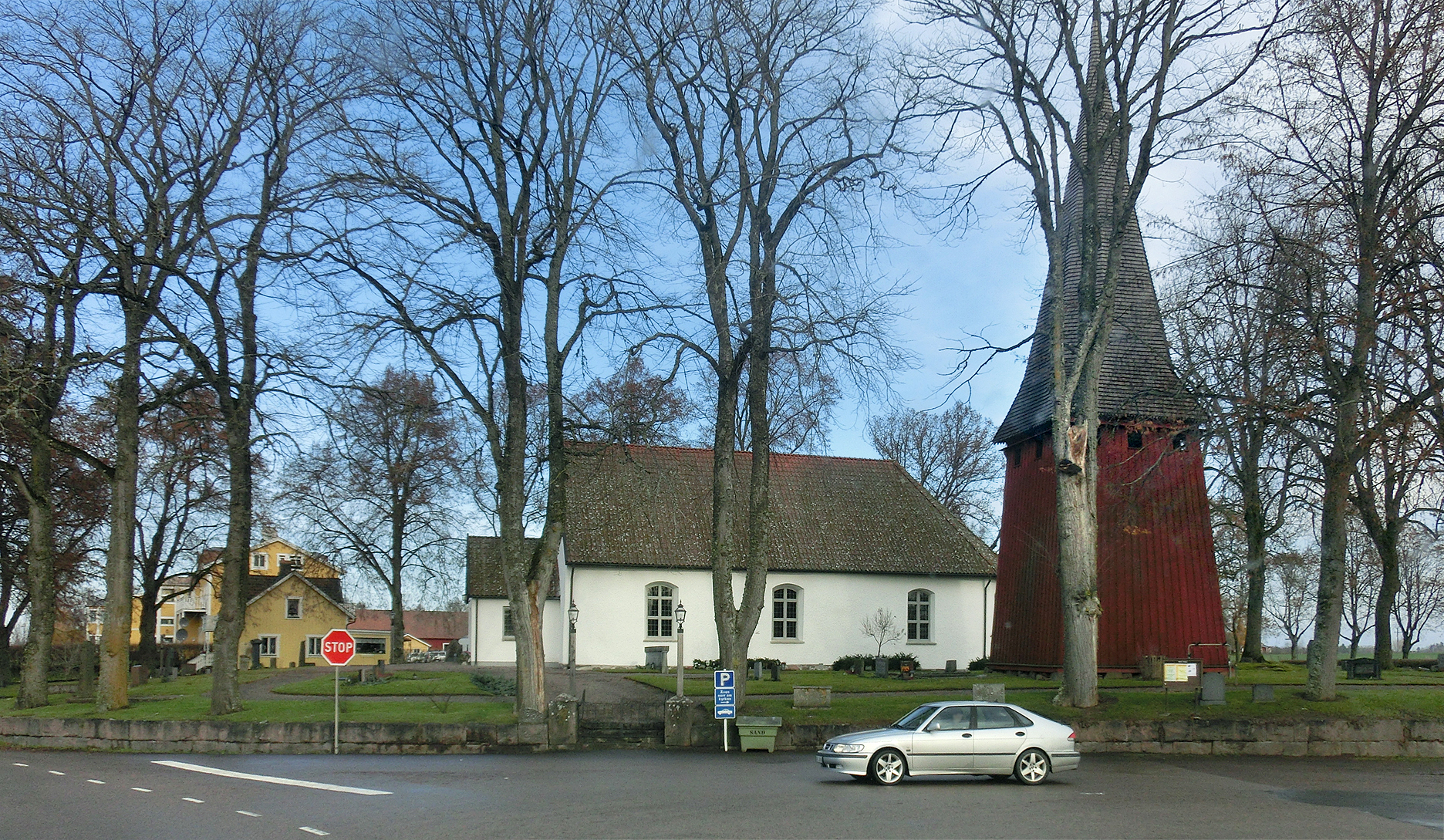 Vads kyrka sedd från sydsydväst.